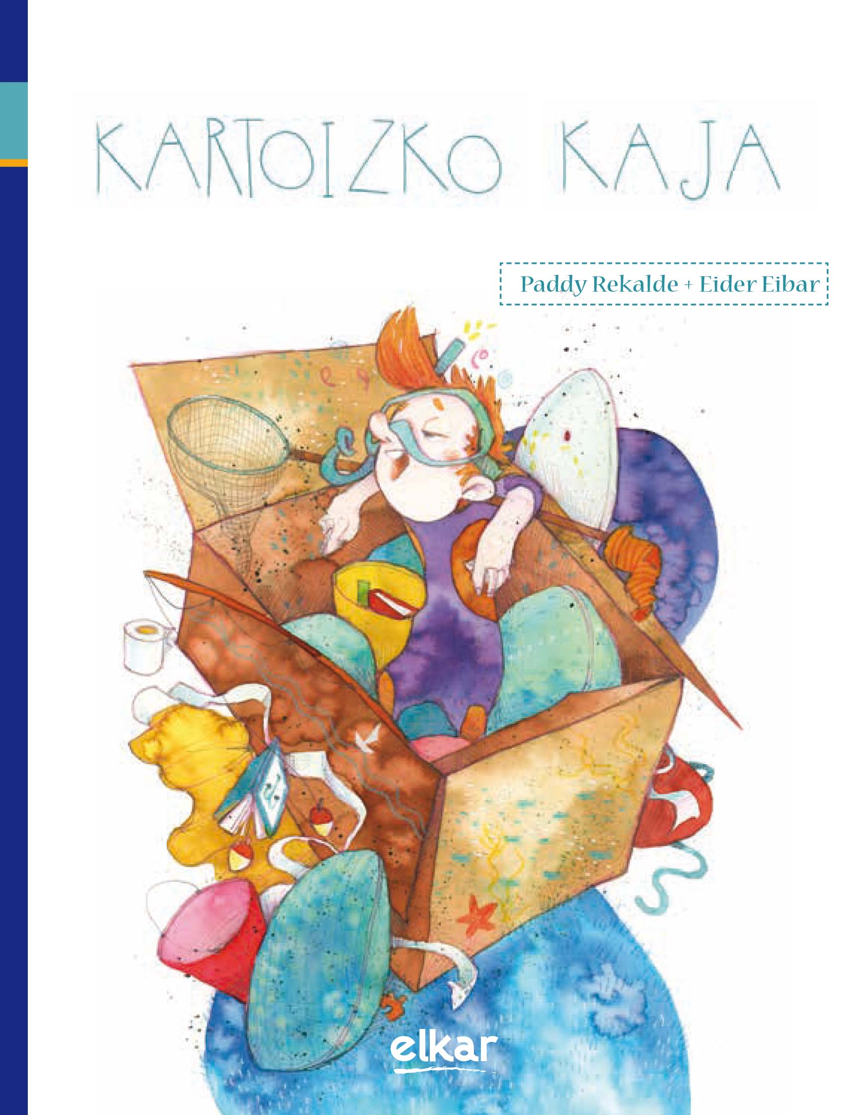 "Kartoizko kaja" liburuaren azala. Testua: Paddy Rekalde. Marrazkiak: Eider Eibar. Sailaren diseinua: Ainhoa Lukas.